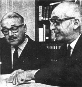 Es un foto del secretario de economía Rogelio Frigerio viendo estadisticas de economia junto al presidente Arturo Frondizi.